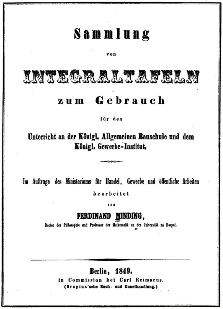 Titelseite der Integraltafel von Ernst Ferdinand Adolf Minding (1806-1885)